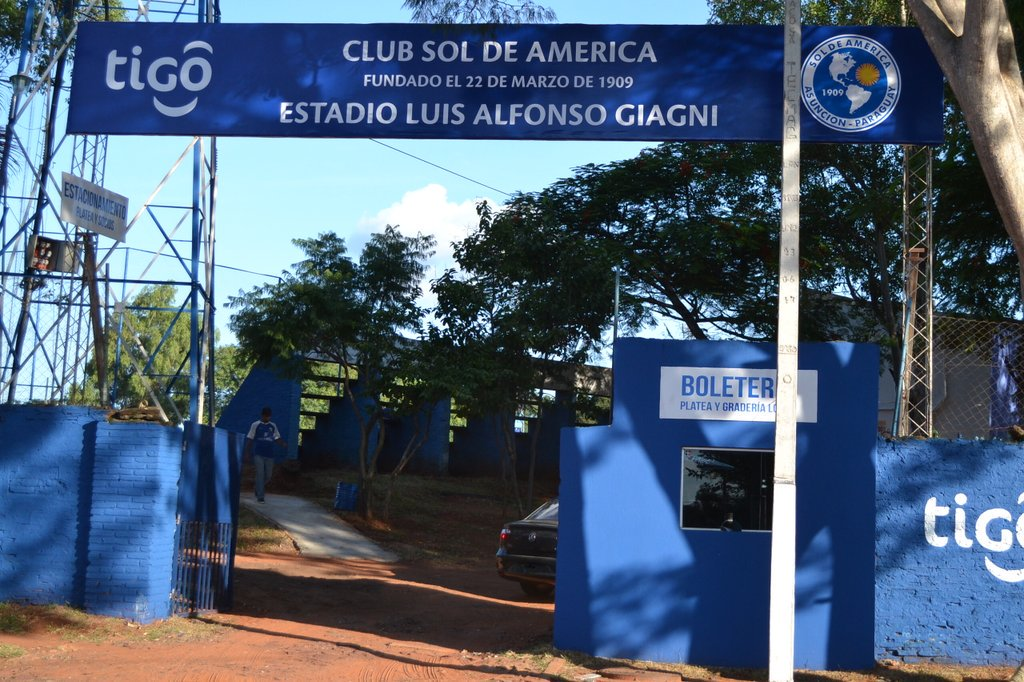 Estadio Luis Alfonso Giagni